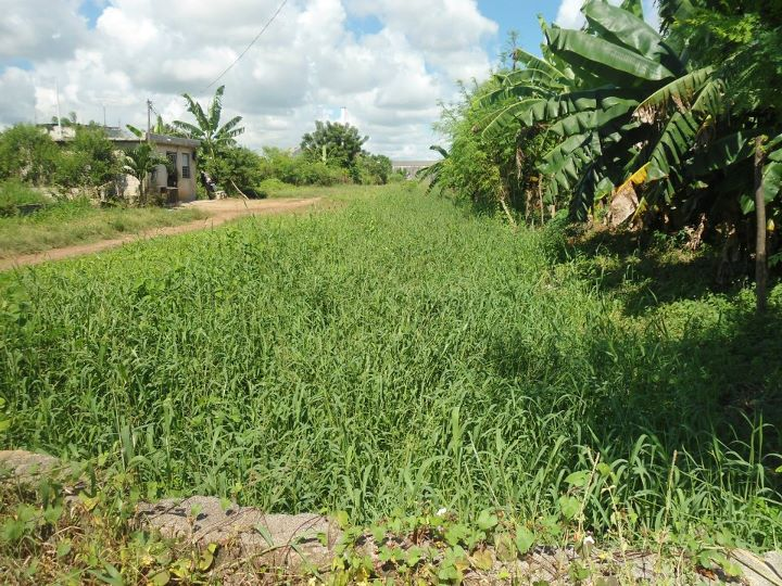 Villa Cesarina en San Pedro de Macoris